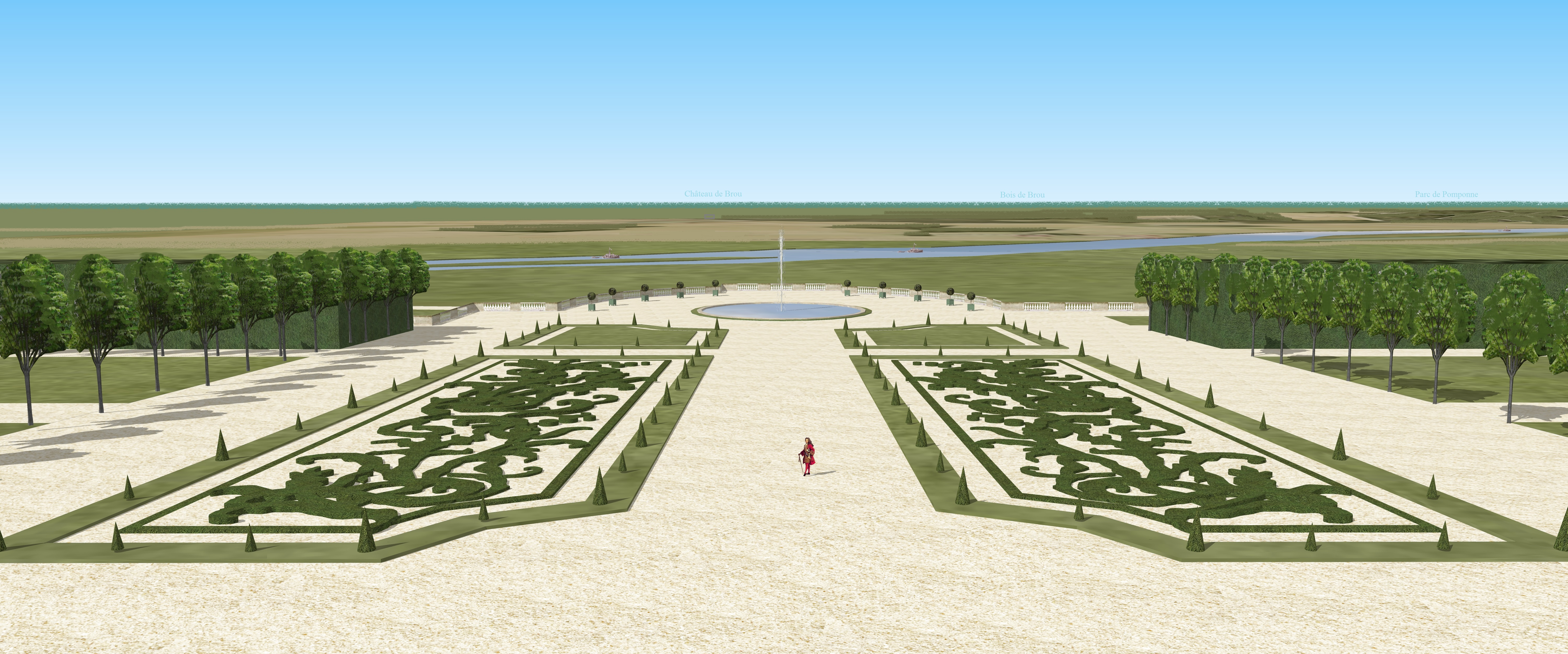 Château de Torcy disparu, restitution 3D